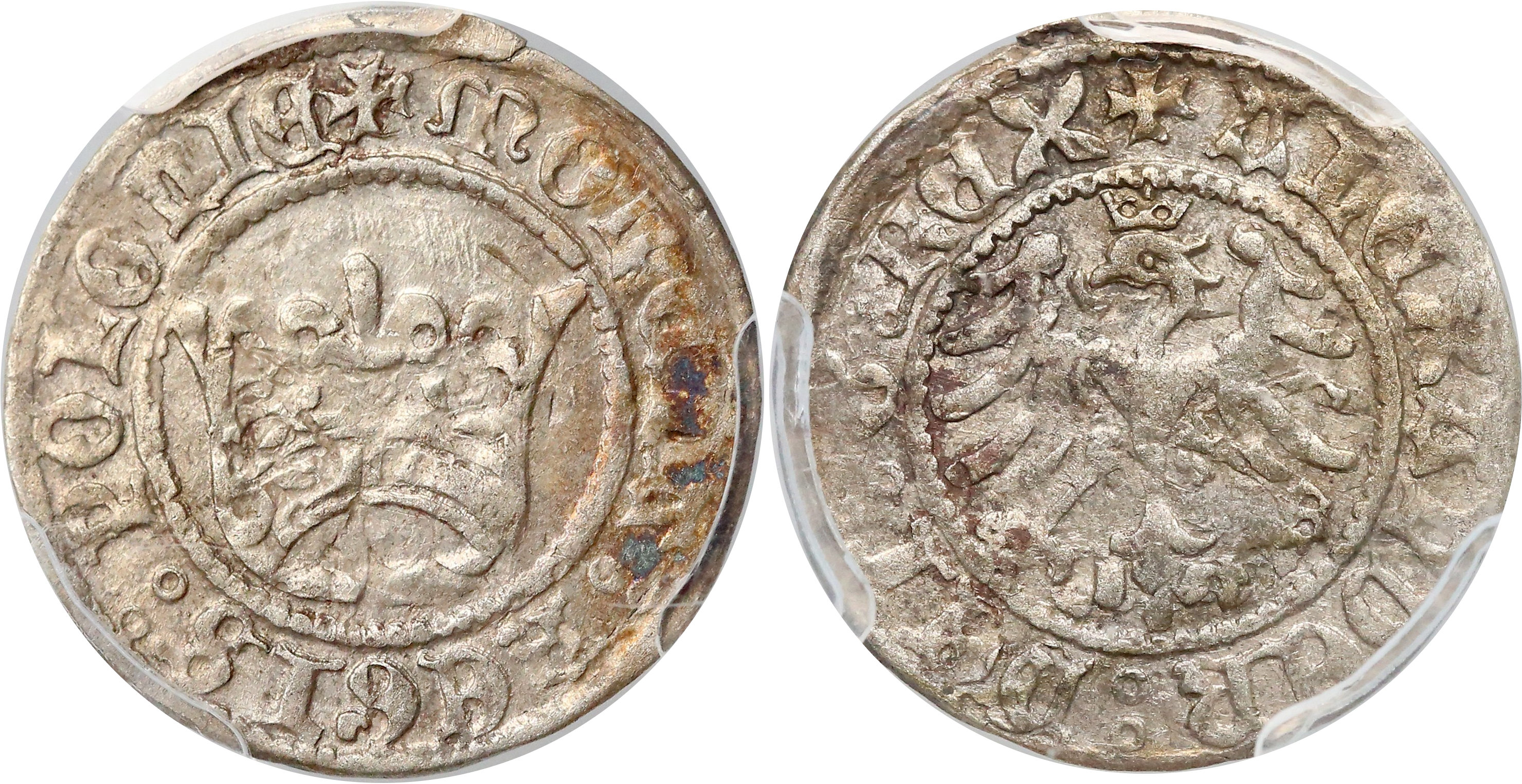 Półgrosz koronny Aleksander Jagiellończyk Kraków